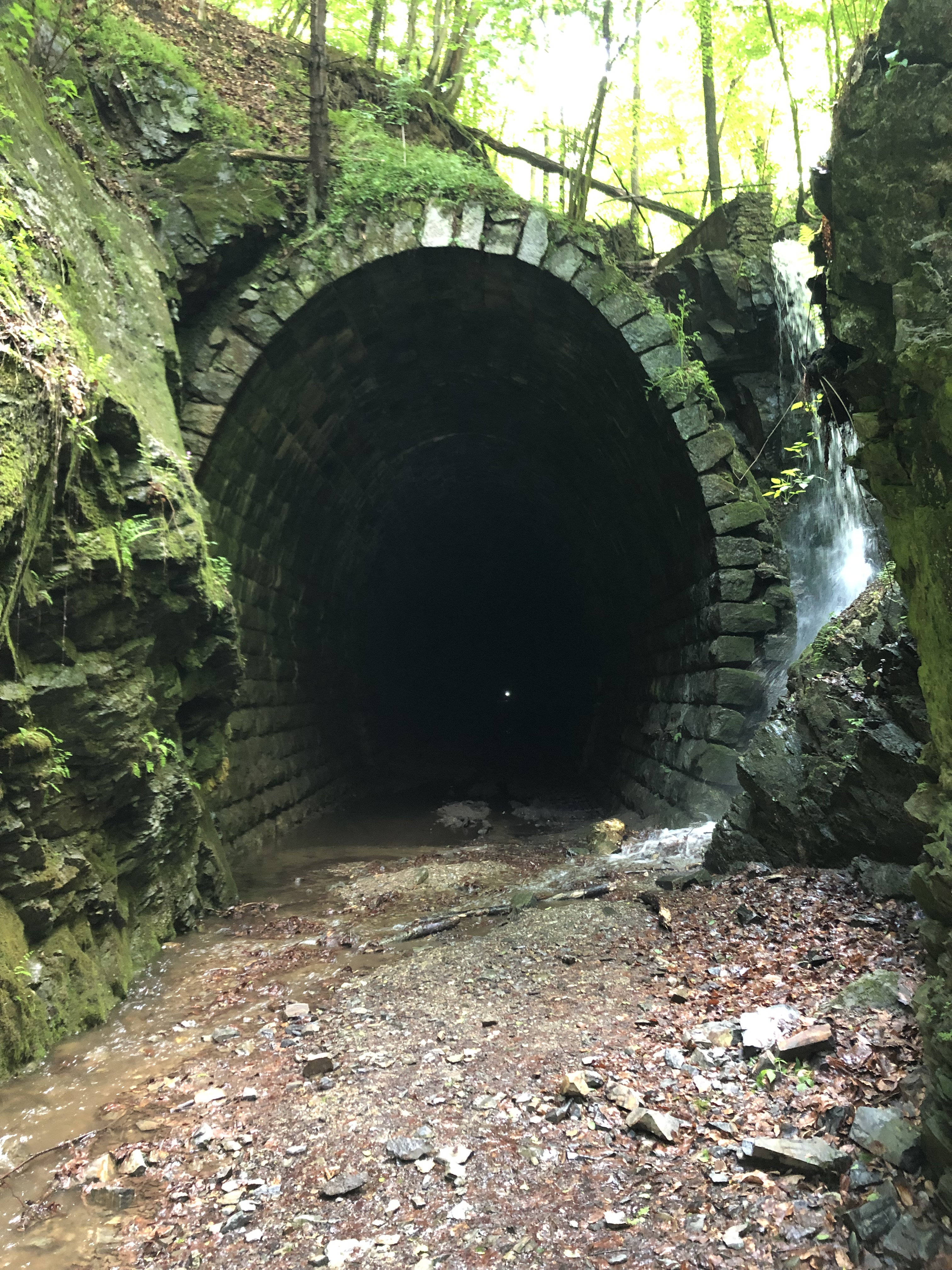 Tunel v slavošovciach, ktroý nikdy nebol dokončený